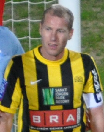 Jonas Henriksson